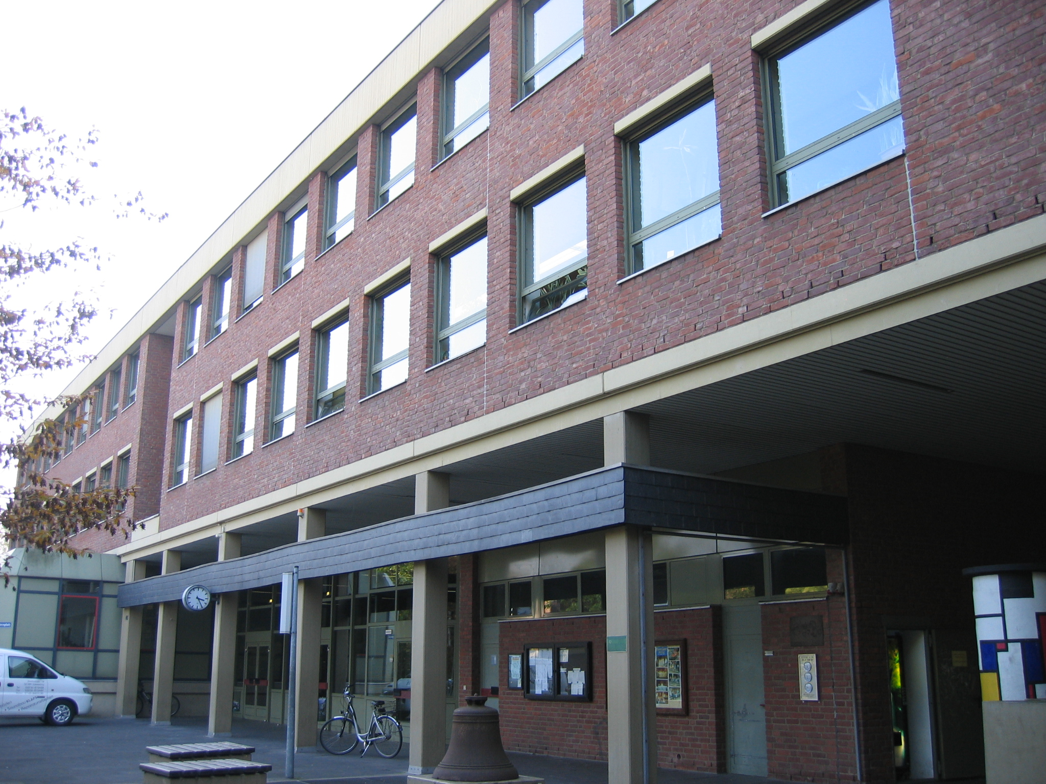 Collegium Josephinum Bonn, Ortsteil Auerberg